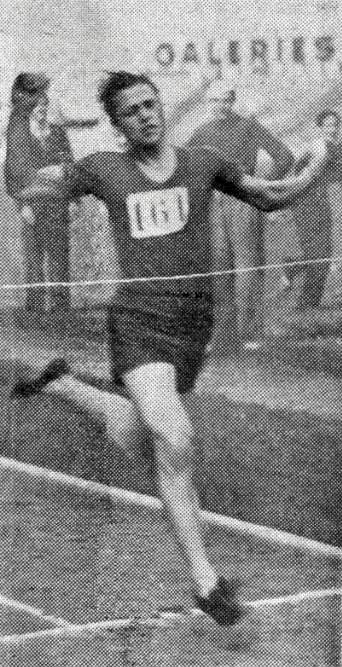 Raymond Marcillac en 1938.